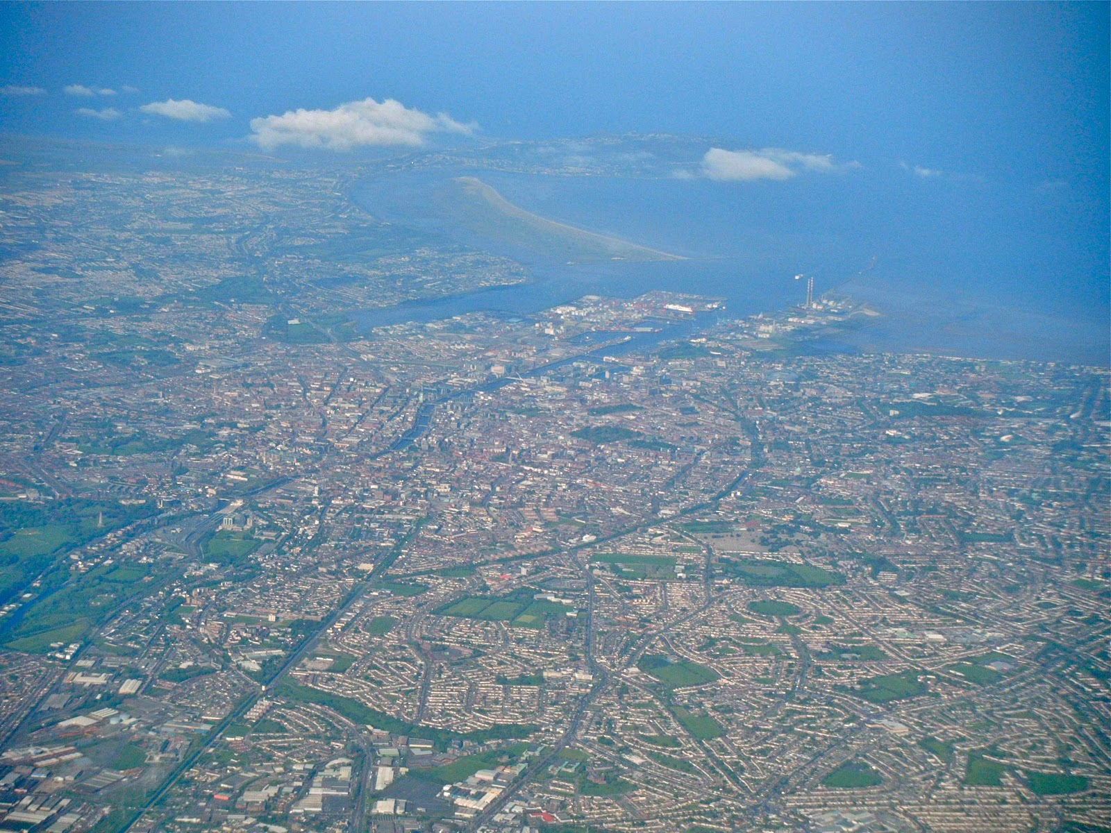 Vista de Dublín desde el aire. Puede distinguirse el río Liffey y la Bahía de Dublín.